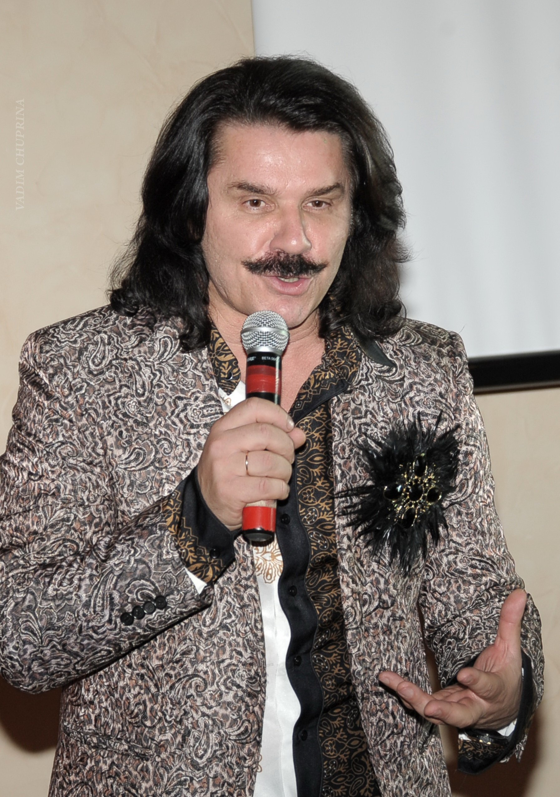 Зибров, Павел Николаевич, фото Чуприна Вадим